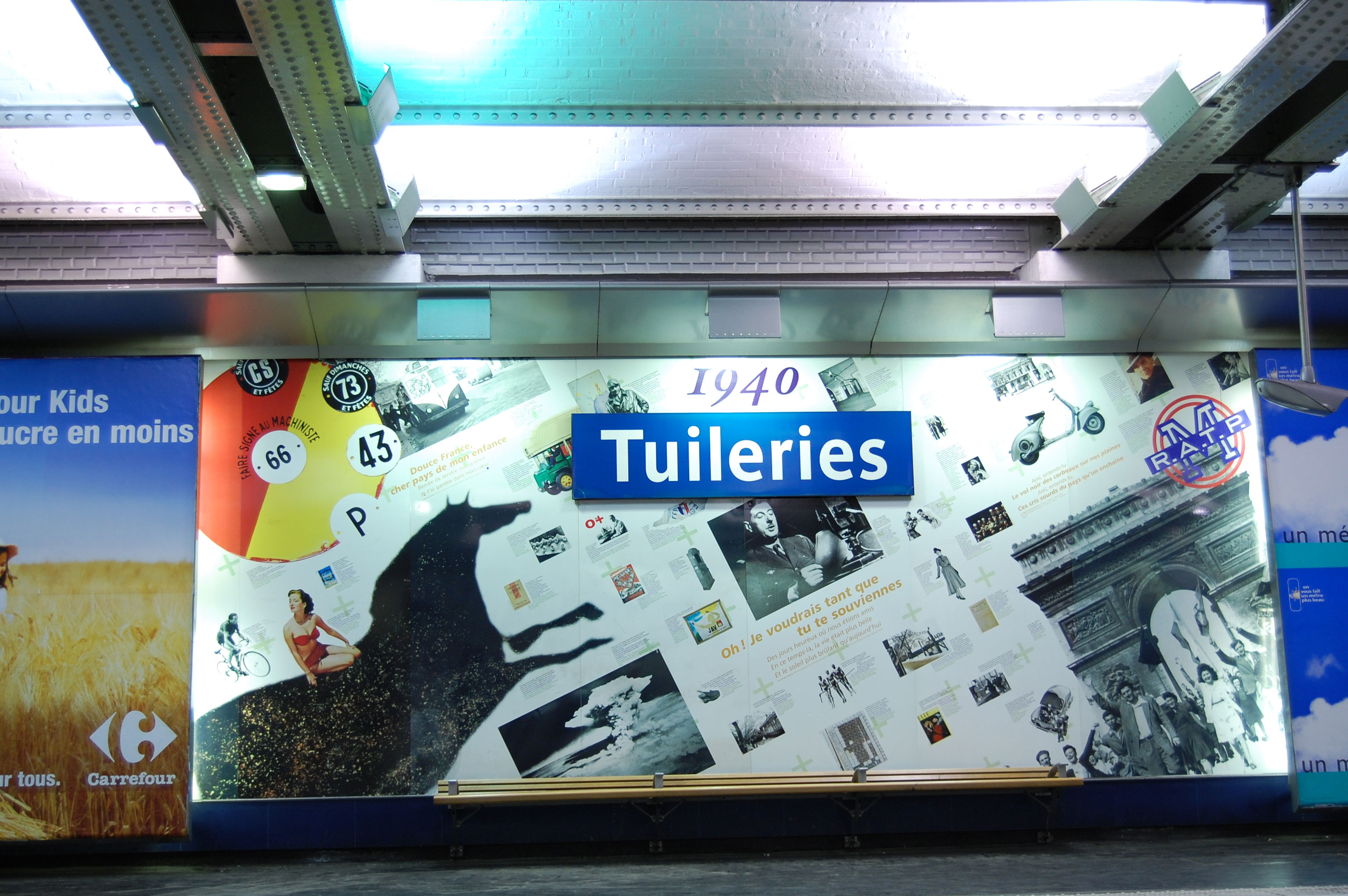 Station Tuileries du Métro de Paris, (ligne 1), Paris, France. La station est décorée avec des collages résumant l'histoire de chaque décennie du XXe siècle. Ici les années 40.